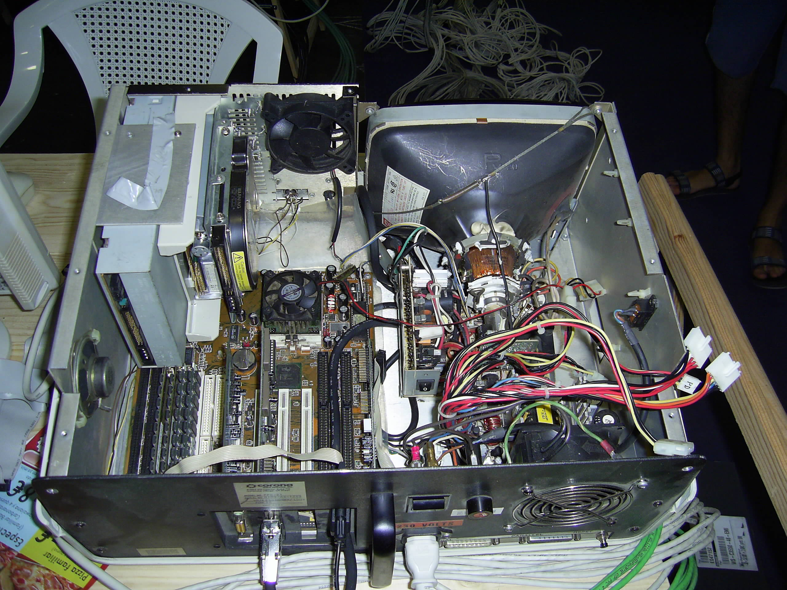 Modding de un Corona Portable con placa Super Socket 7, CPU AMD K6 III, tomada en el Euskal Encounter 2006